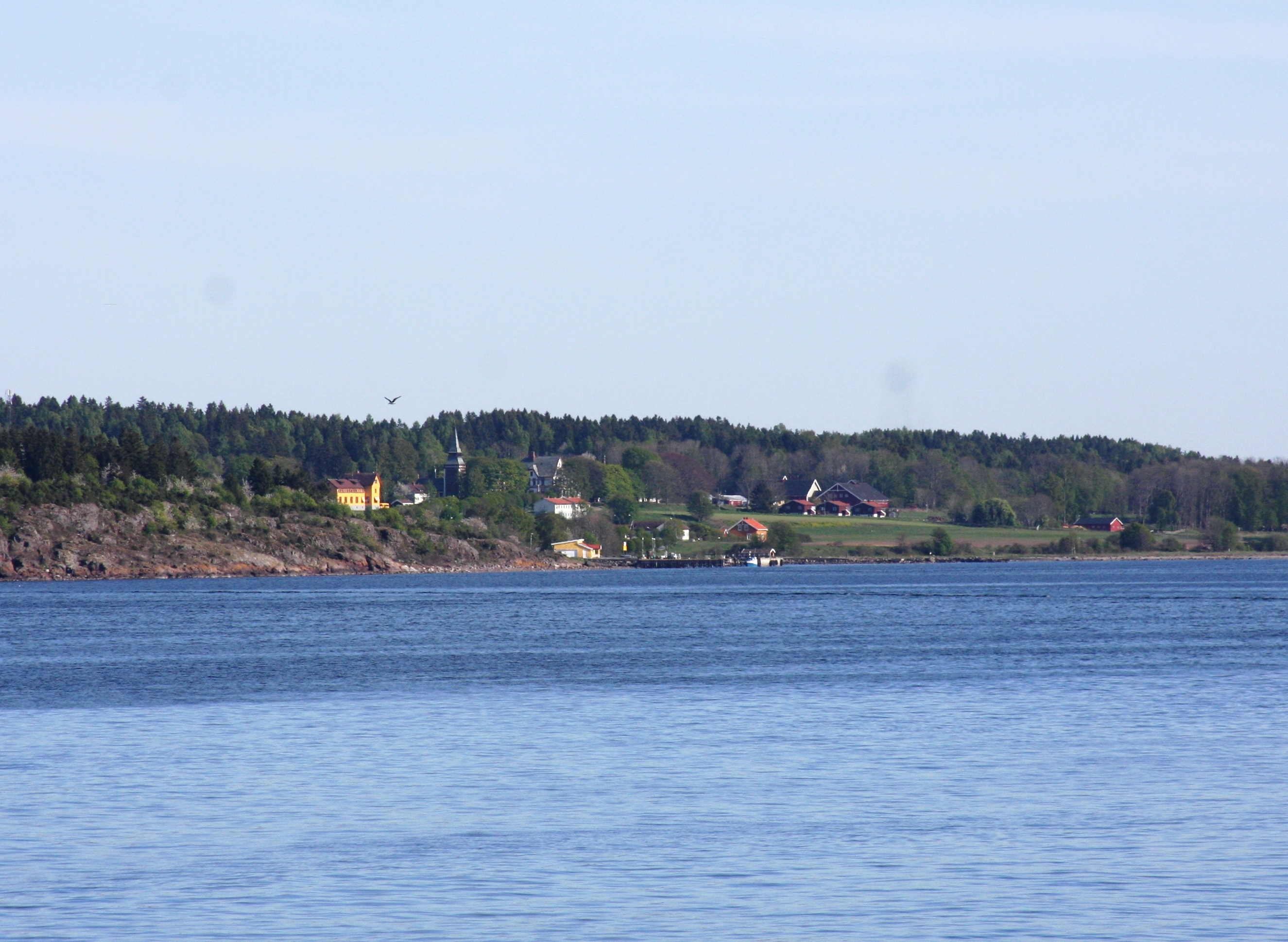 Bastøy kirke, Vestfold